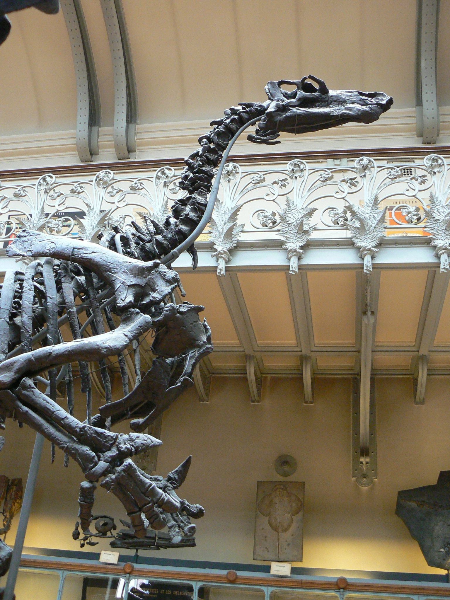 Iguanodon bernissartensis